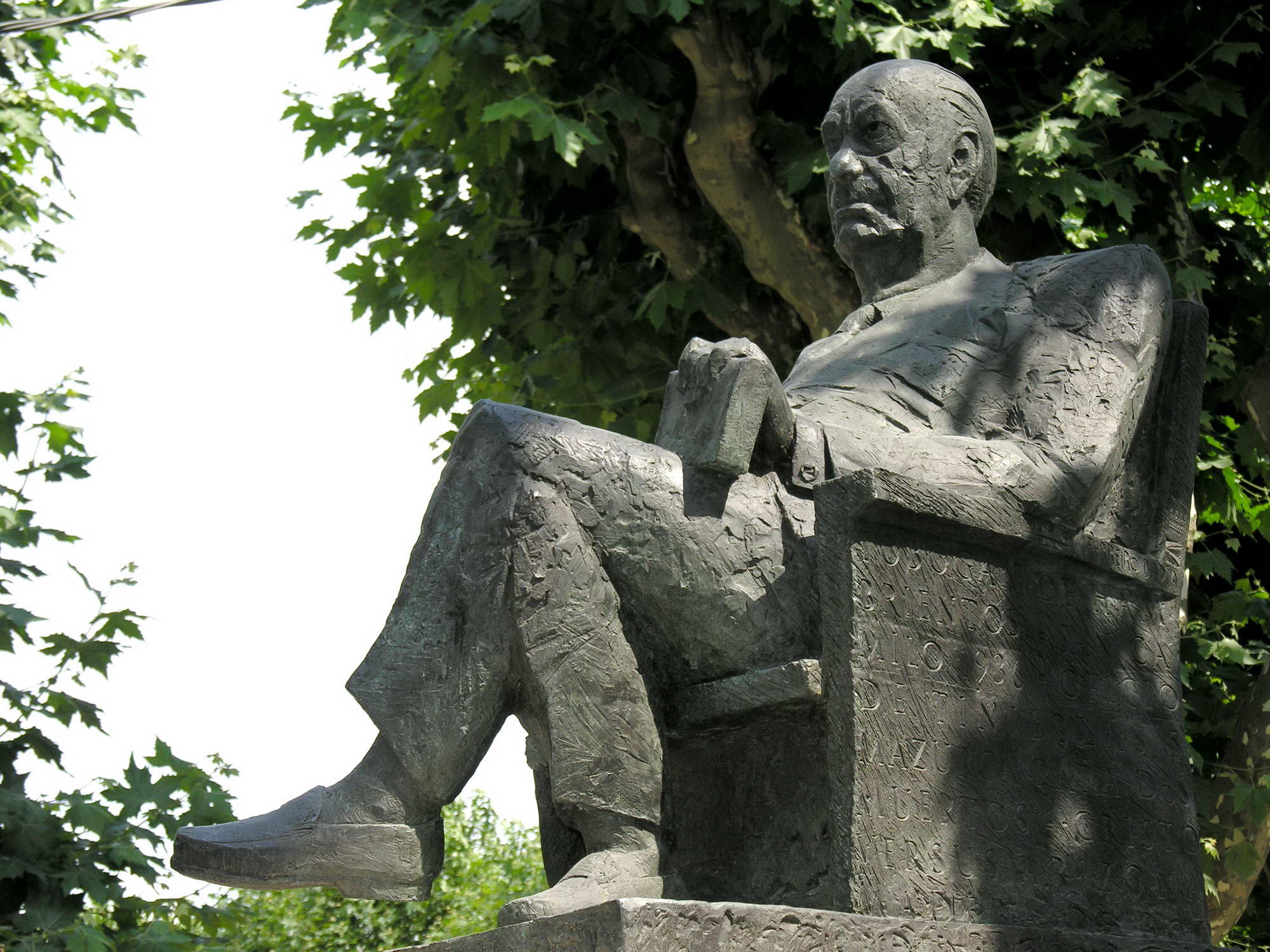 Camilo José Cela, Padrón, Galicia Publish by= Luis Miguel Bugallo Sánchez.